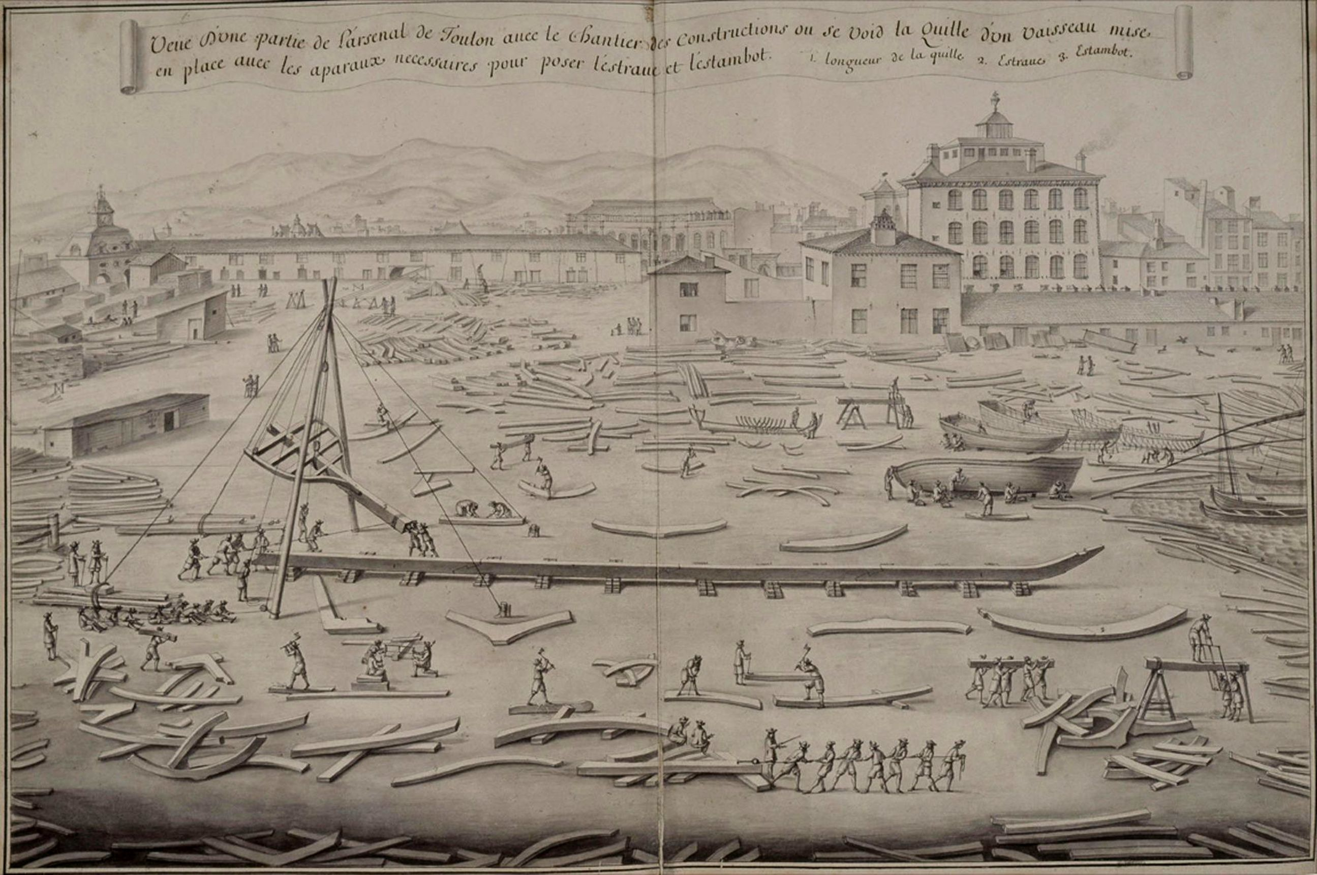 Arsenal de Toulon vers 1670. Montage d'un vaisseau avec charpentiers de marine et pièces de bois. Album de Colbert.